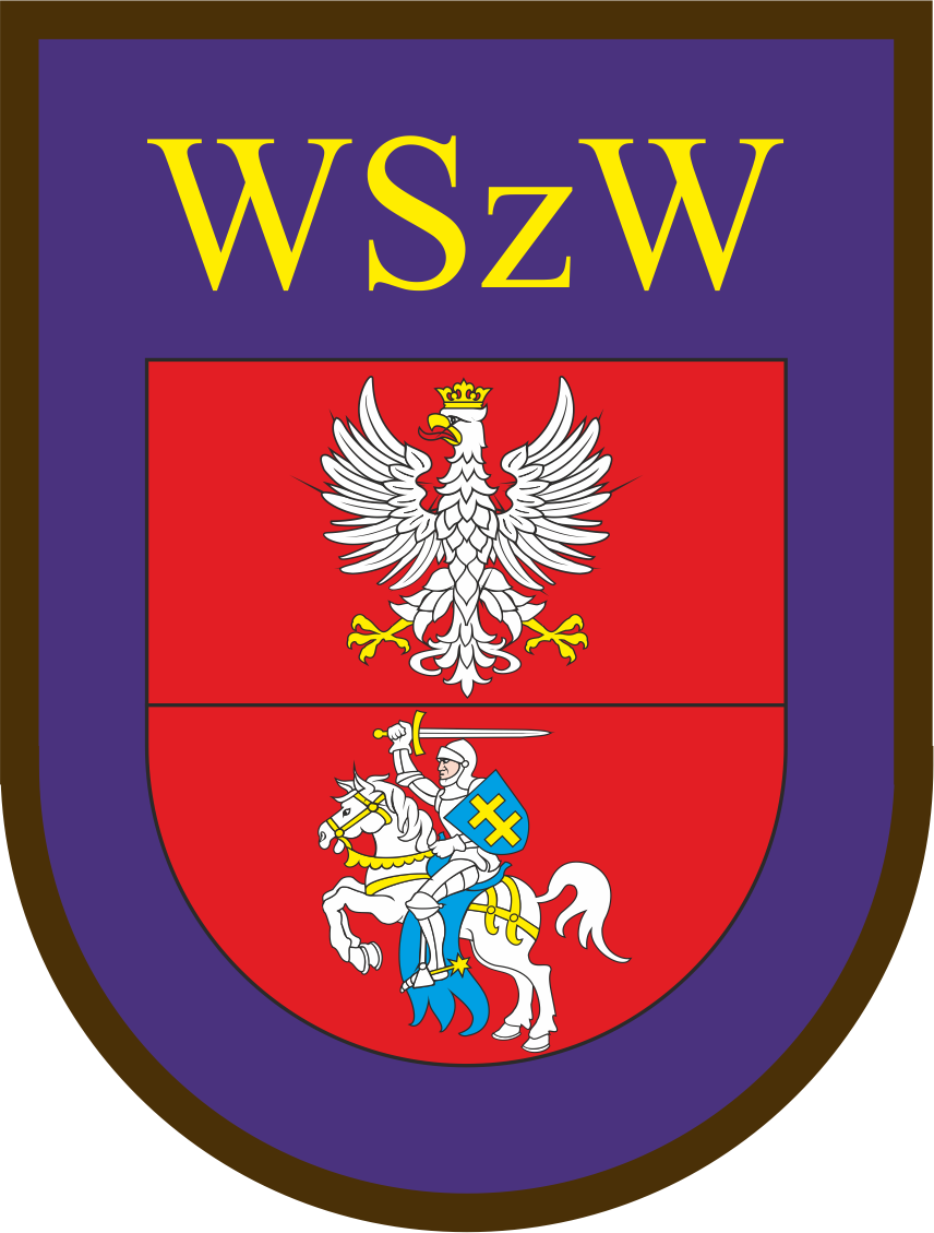 Oznaka rozpoznawcza WSzW w Białymstoku